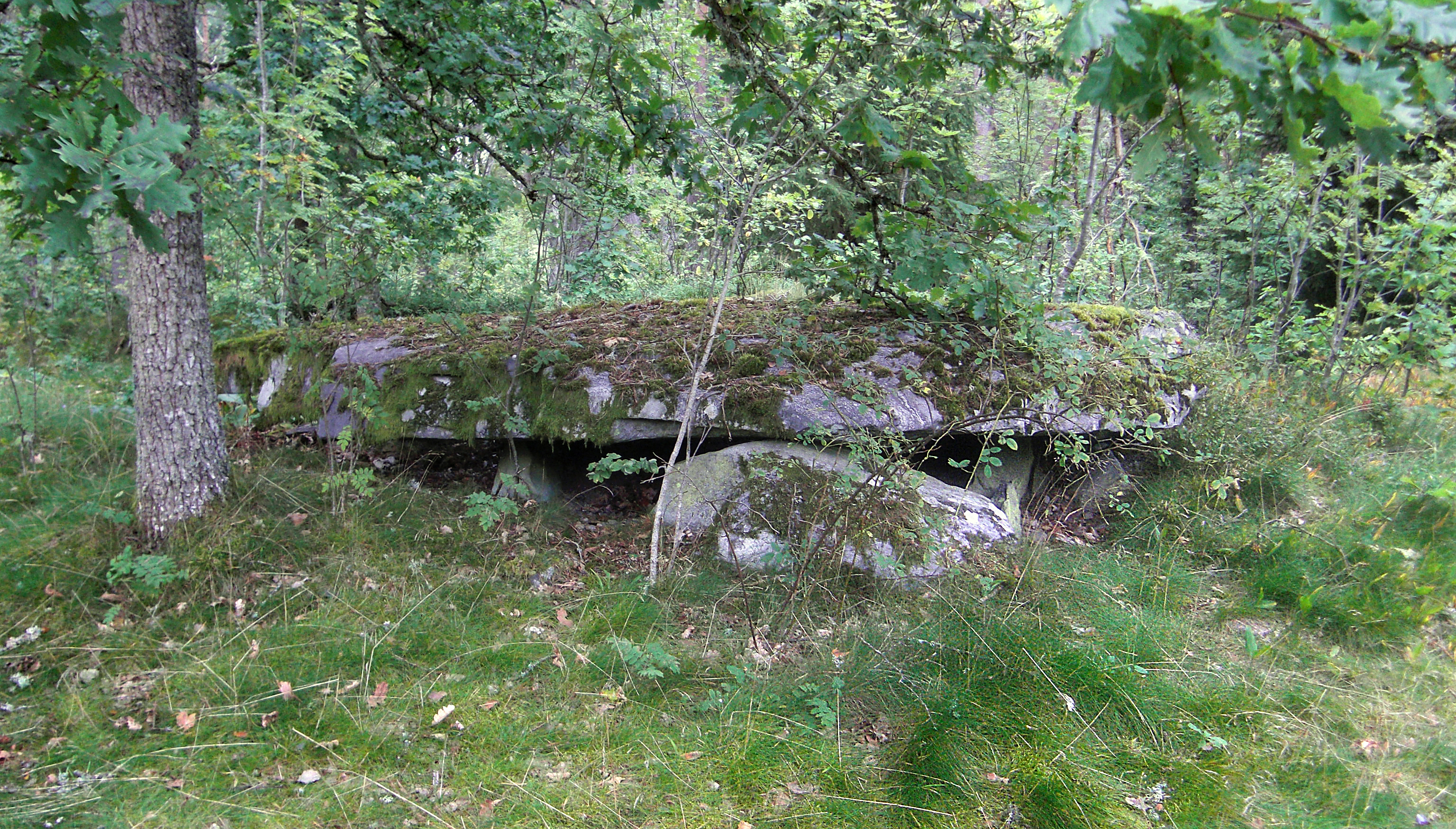 Hällkista (Raä-nr Levene 25:1) i Levene socken strax intill gränsen till Sparlösa socken, Viste härad, Vara kommun, f.d. Skaraborgs län, Västergötland, Västra Götalands län, Sverige. Hällkistan, som blev restaurerad 1923, är 5,8 meter lång och har fyra takhällar. Hällkistan anlades under senneolitikum. Hällkistan ligger cirka 60 meter VNV om Björkevis parkering.